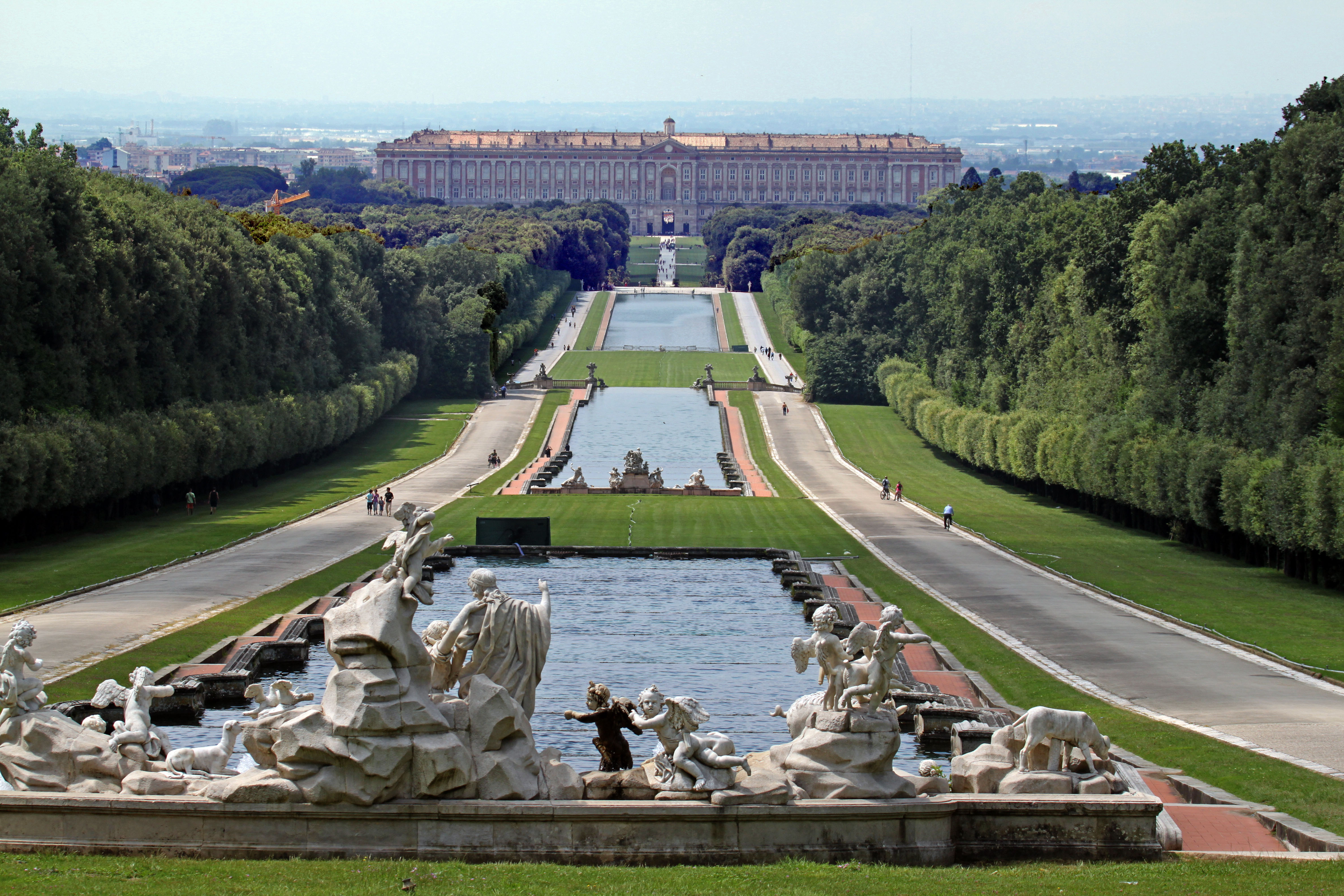 Reggia di Caserta: prospettiva dalla fontana di Venere e Adone